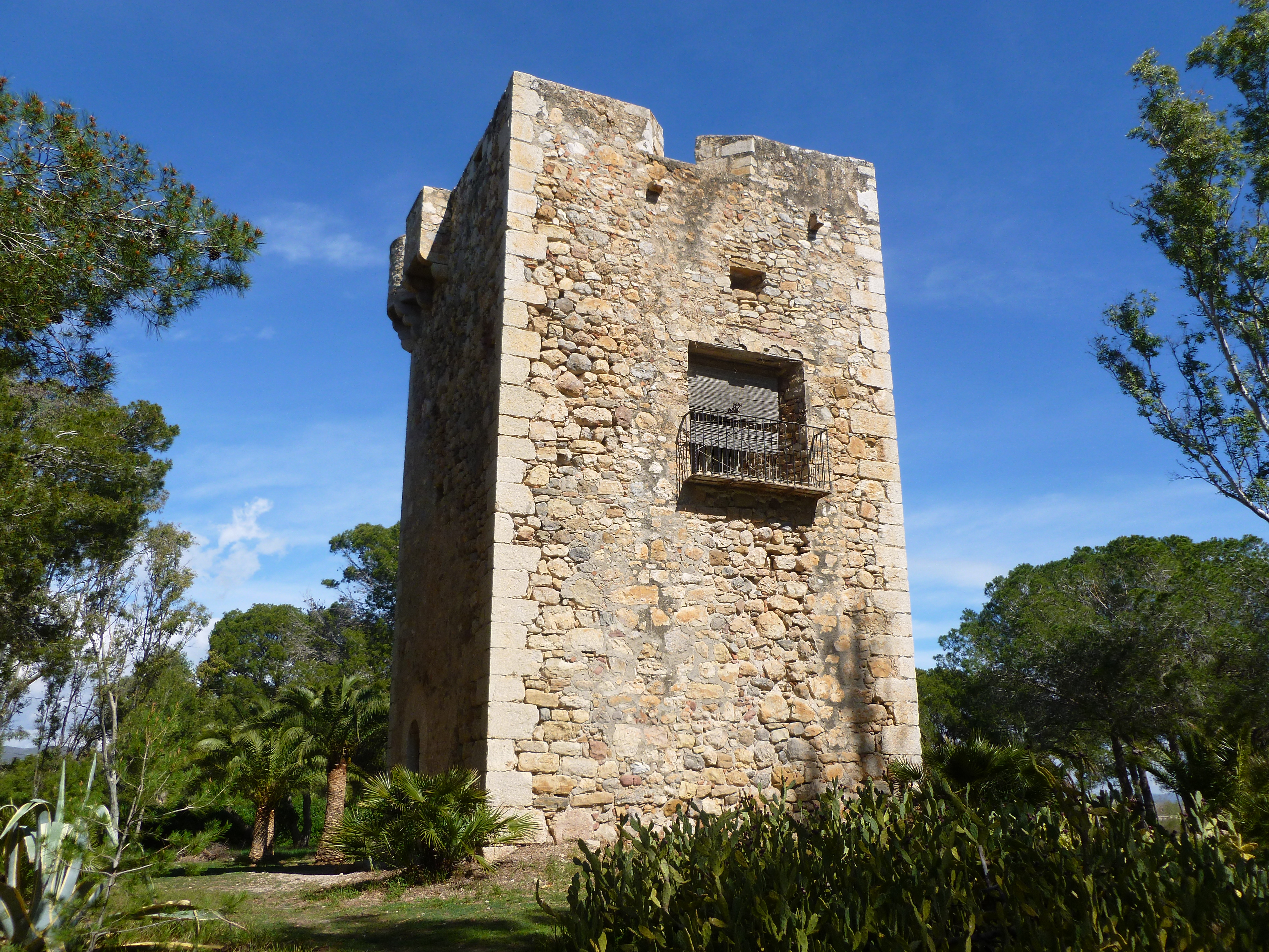 Torre defensiva al municipi espanyol de Cabanes